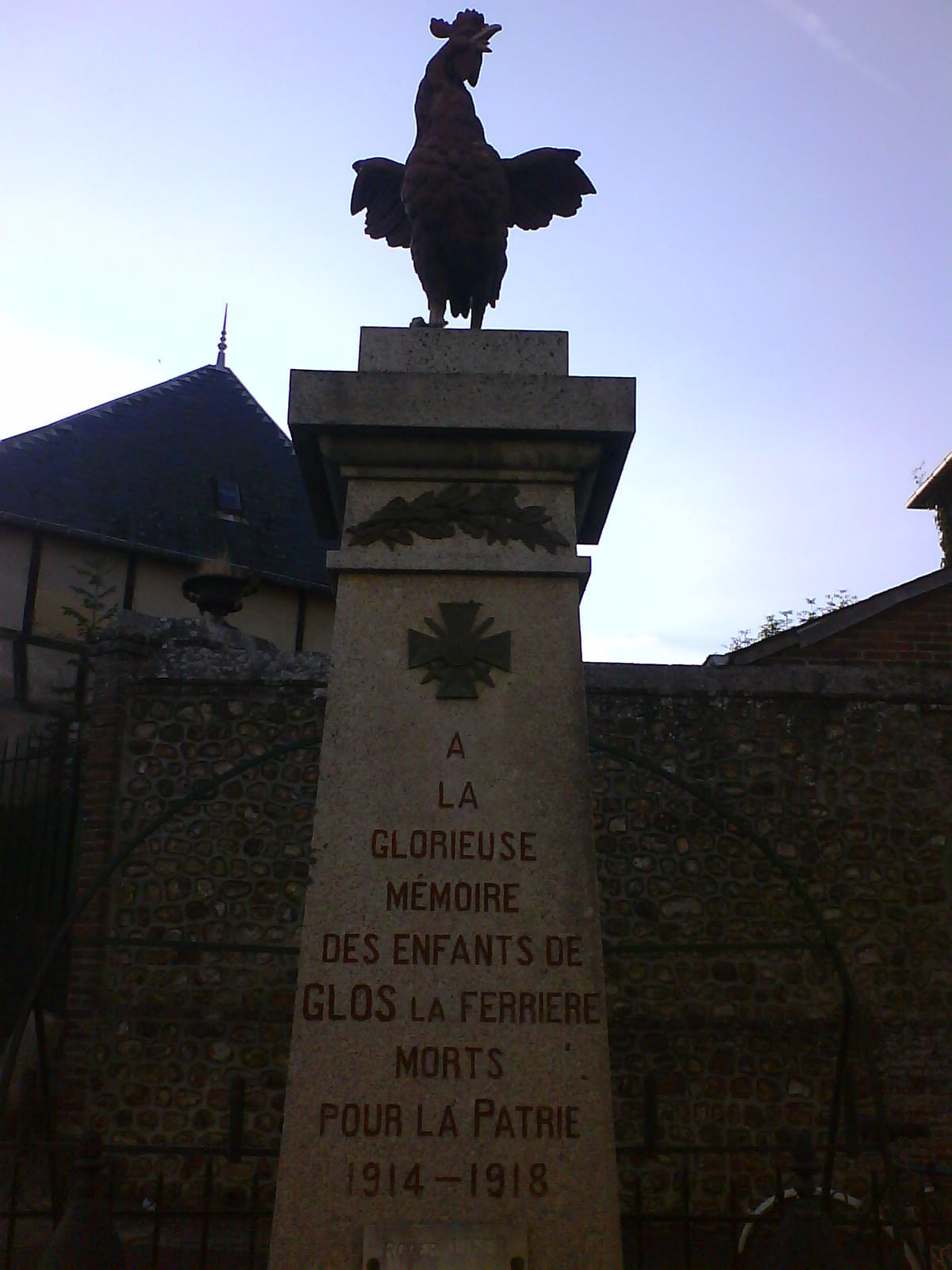 Monument aux morts de la Guerre 1914-1918 à Glos-la-Ferrière.